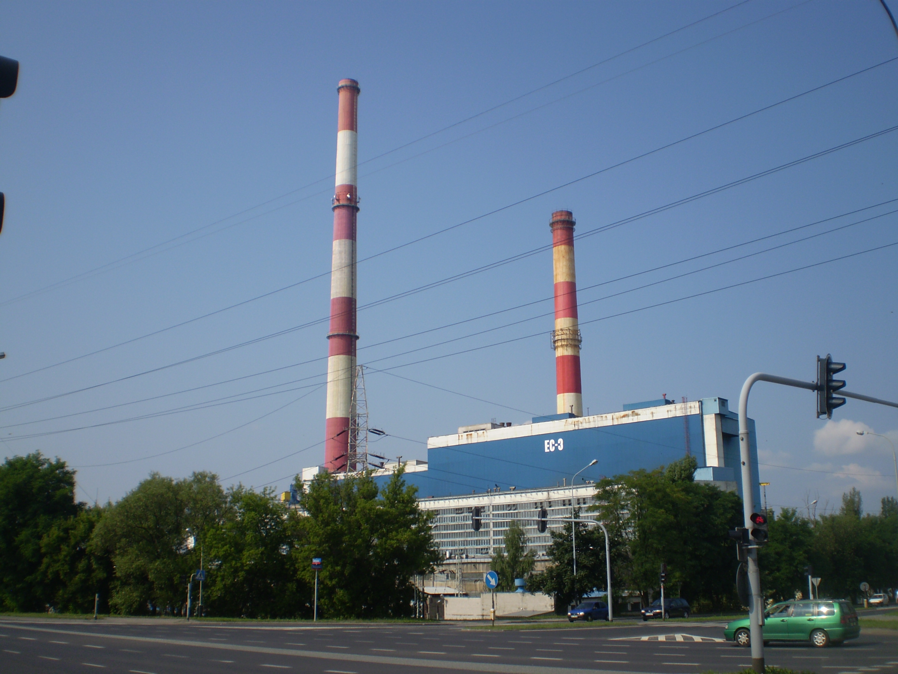 Łódź- EC3